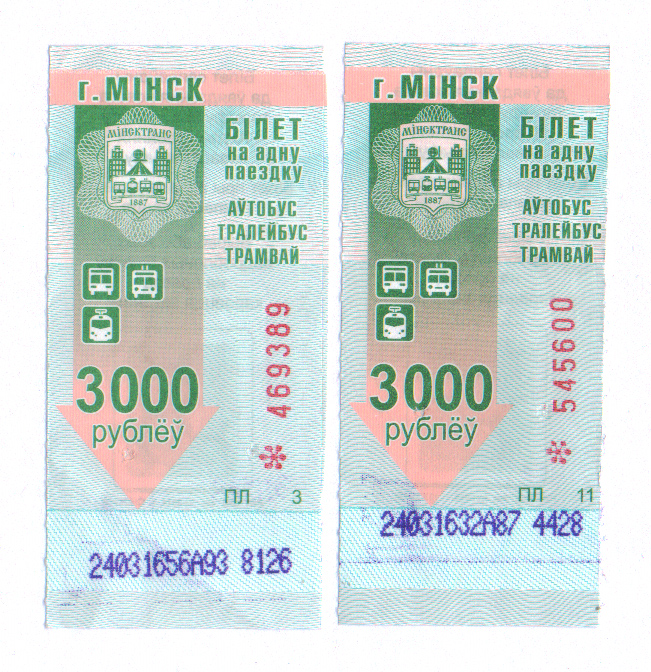 Новые талоны на проезд в общественном транспорте Минска, 2014 год. Внизу видны отметки, сделанные электронным компостером: XXXX дата, XXXX время, A автобус, XX маршрут автобуса, XXXX порядковый номер билета